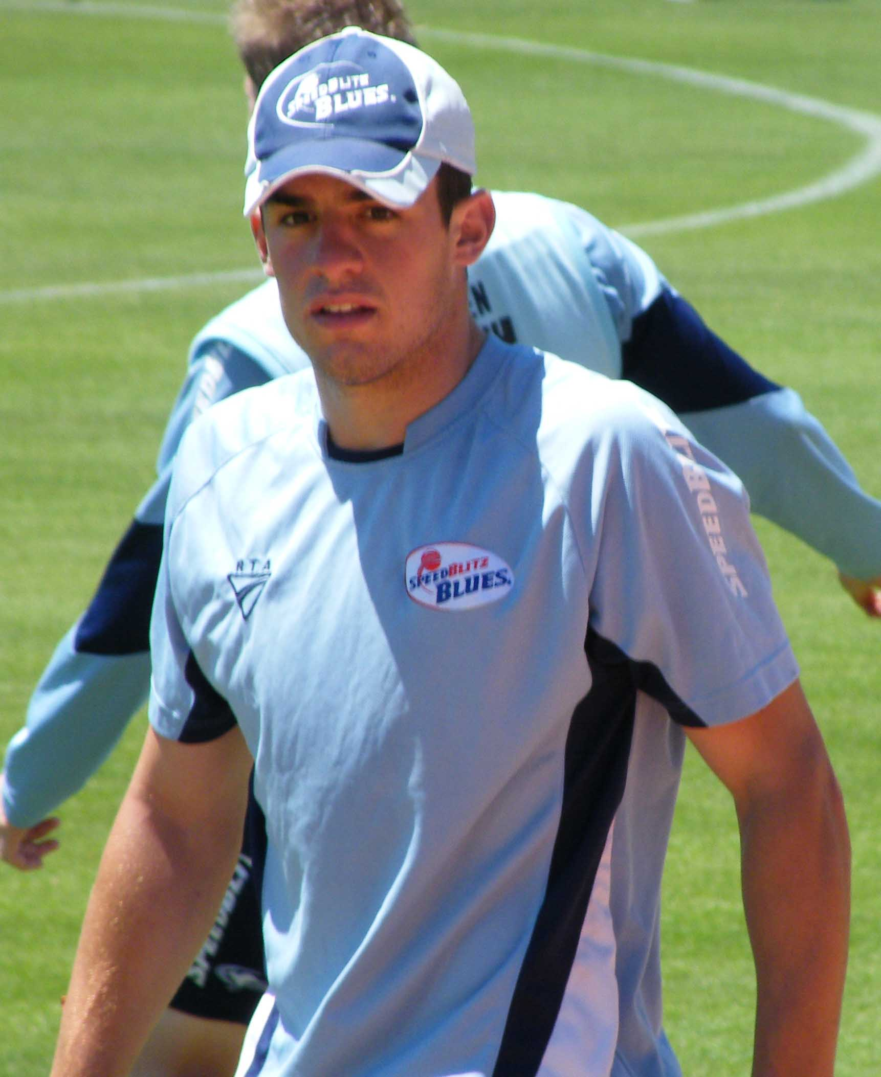 Moises Henriques